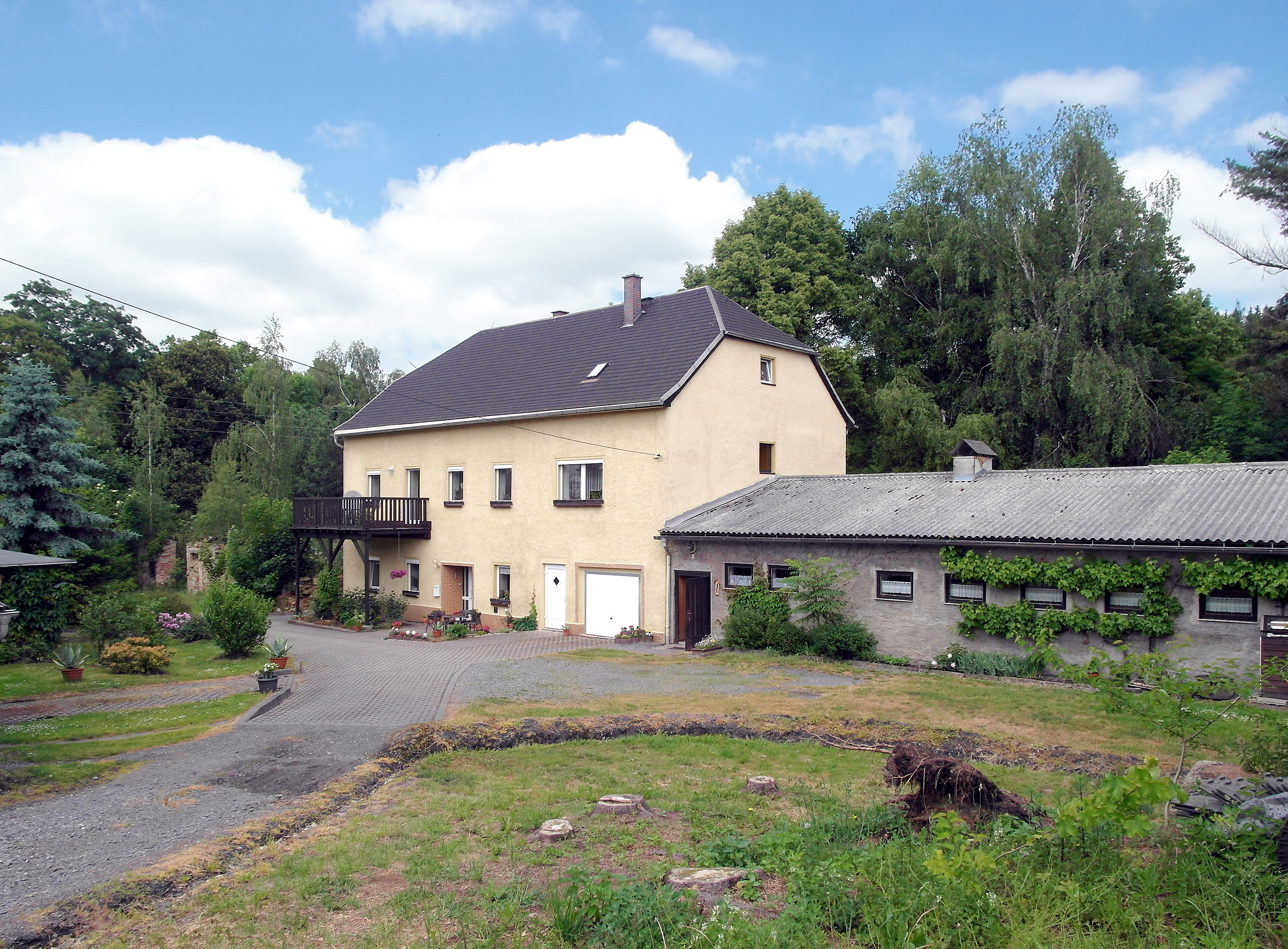 10.06.2015 09618 Linda (Brand-Erbisdorf) Mittelweg 1 (GMP: 50.873817,13.283575): Herrenhaus Linda, vermutlich um 1750 für Curt Alexander von Schönberg erbaut. Von einst barocken Erscheinungsbild ist nichts mehr vorhanden. [SAM0860.JPG]20150610405DR.JPG[c)Blobelt